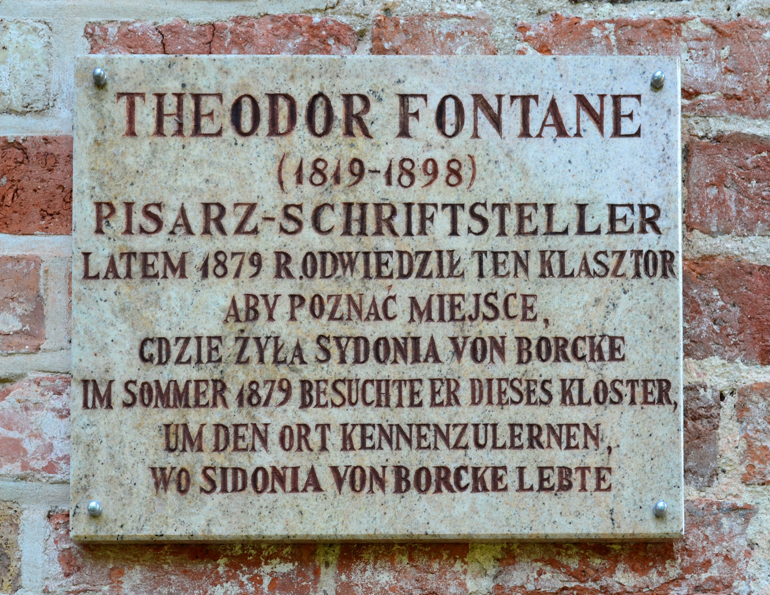 Marianowo - zespół klasztorny cystersów